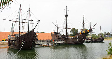 Réplica de "Las tres Carabelas" del descubrimiento de América, en el "Muelle de las Carabelas", situado en el paraje de La Rábida, en Palos de la Frontera.